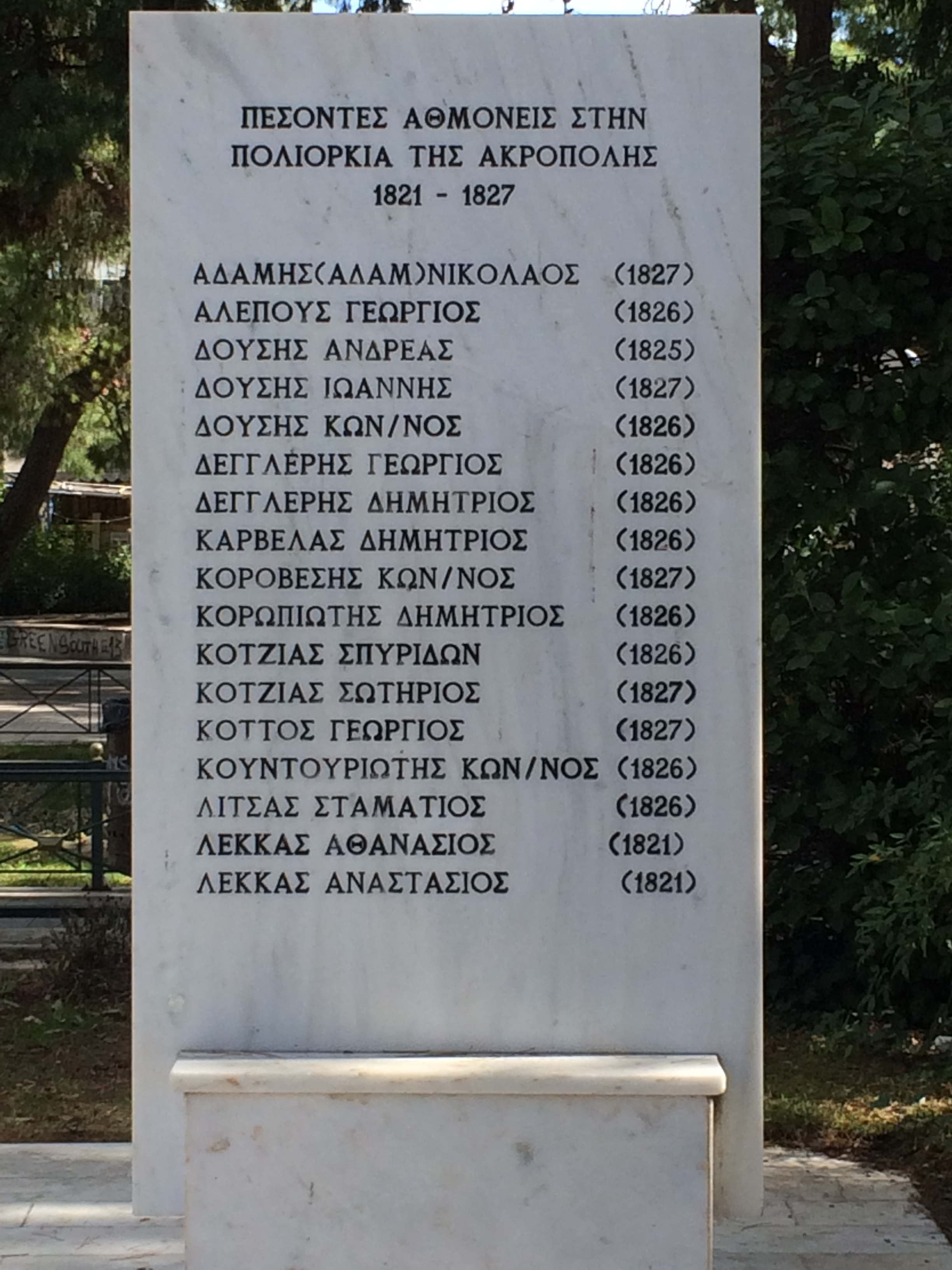 Πεσόντες Αθμονείς στην Πολιορκία της Ακρόπολης 1821-1827